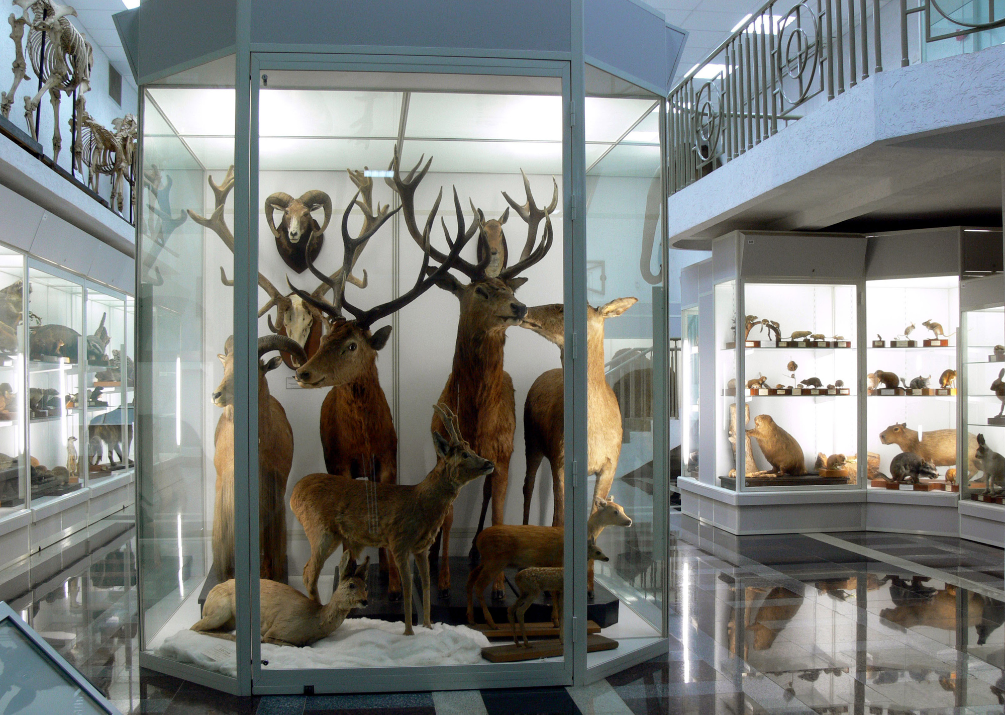 Зоомузей биологического факультета БГУ